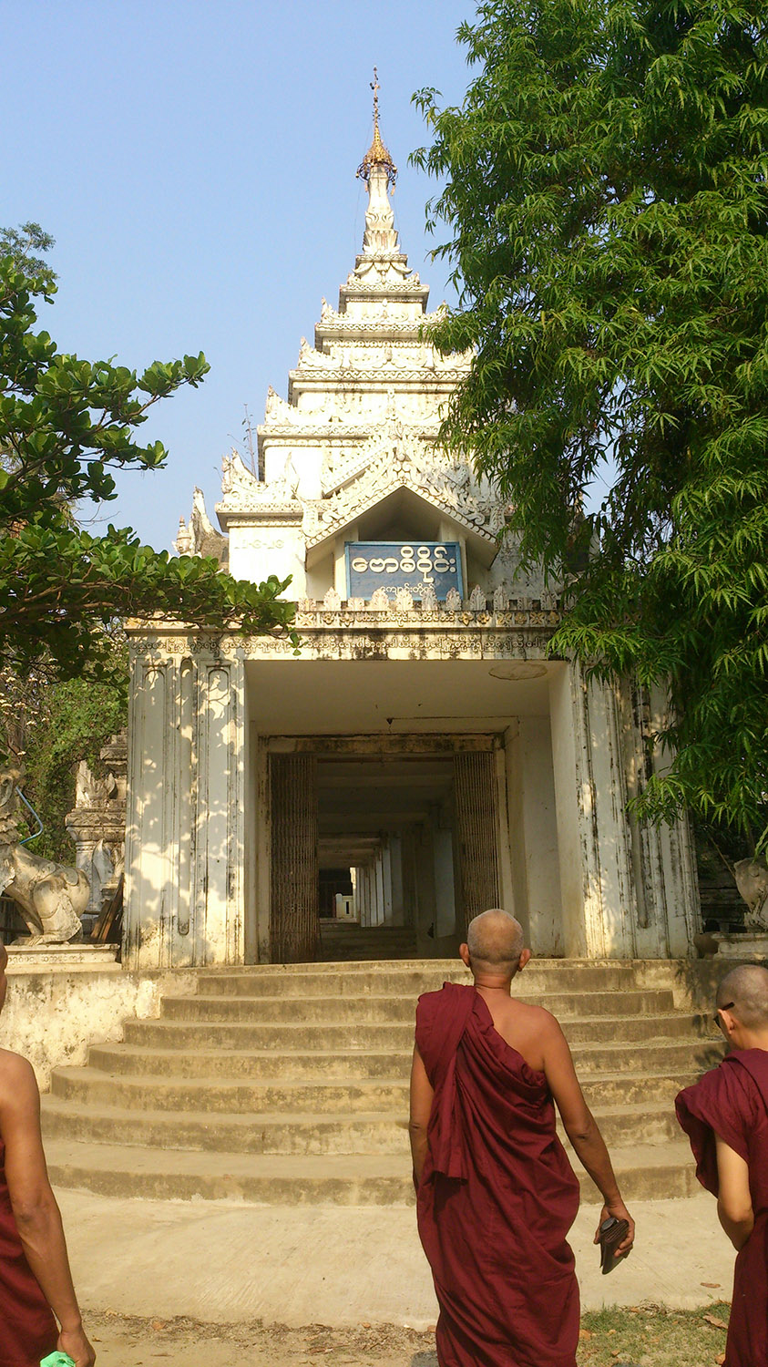 မြန်မာဘာသာ: ဗောဓိဝိုင်း ကျောင်းတိုက်